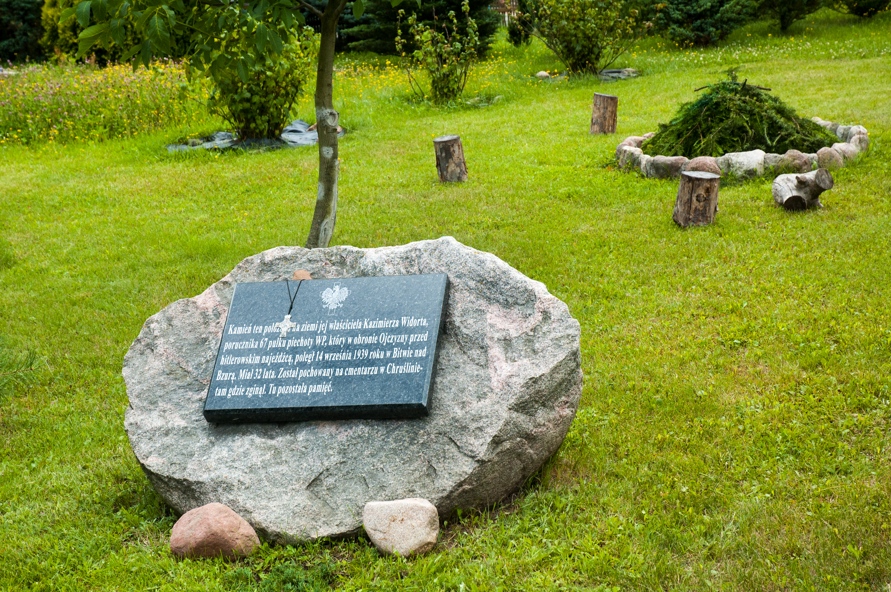 Kazimierz Widort - kamień upamiętniający - Michałów Reginów